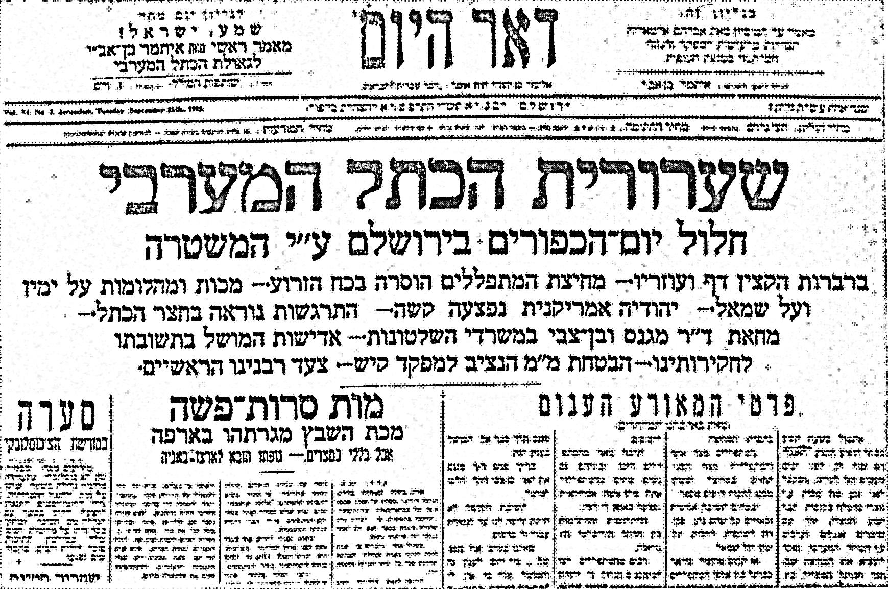 אחד הגליונות המפורסמים ביותר של דואר היום, ספטמבר 1928, מודיע בדרמטיות אופיינית על תקרית שהייתה בכותל המערבי בזמן תפילות יום הכיפורים של שנת תרפ"ט